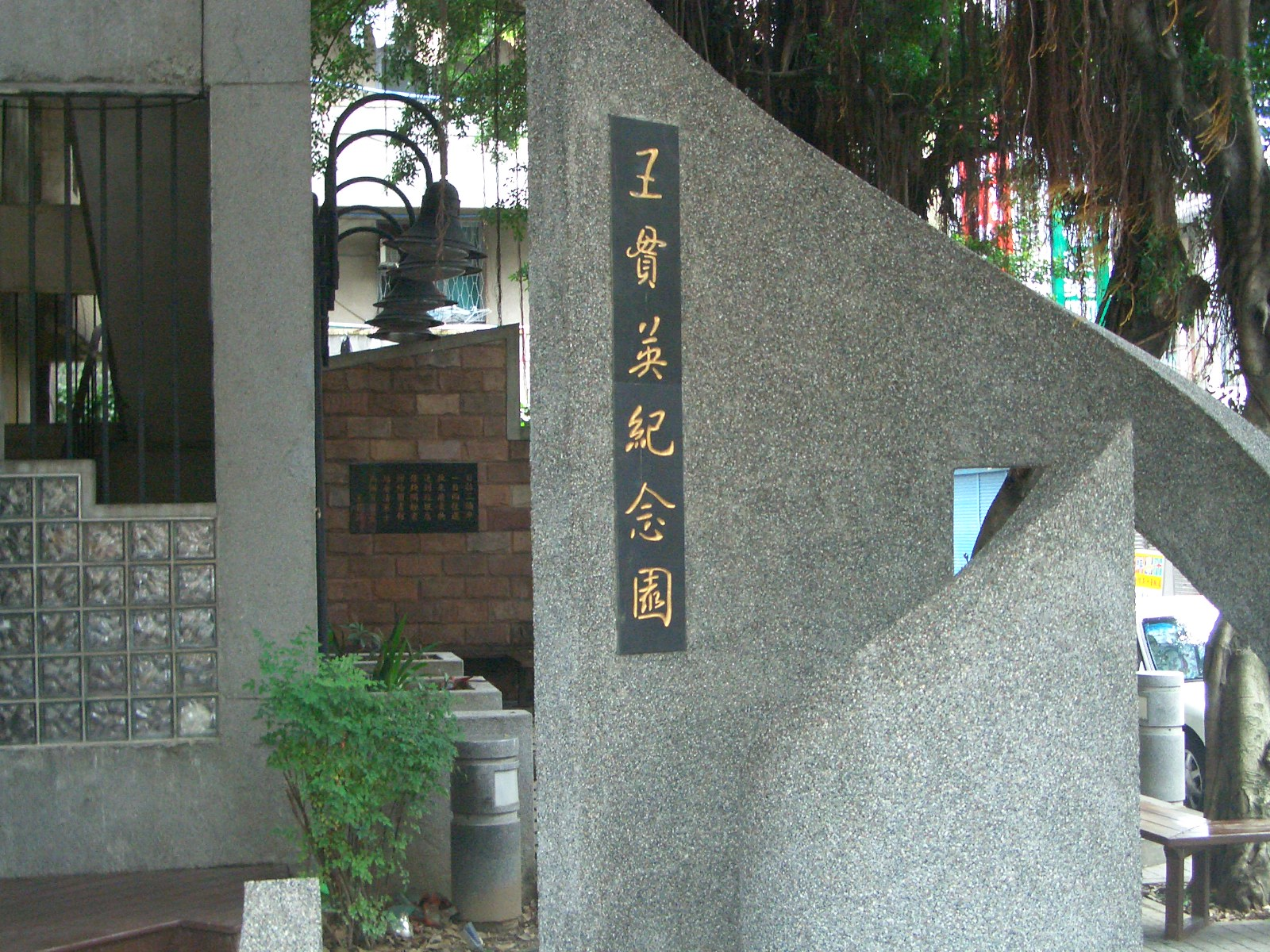 臺北市立圖書館王貫英先生紀念圖書館王貫英紀念園。